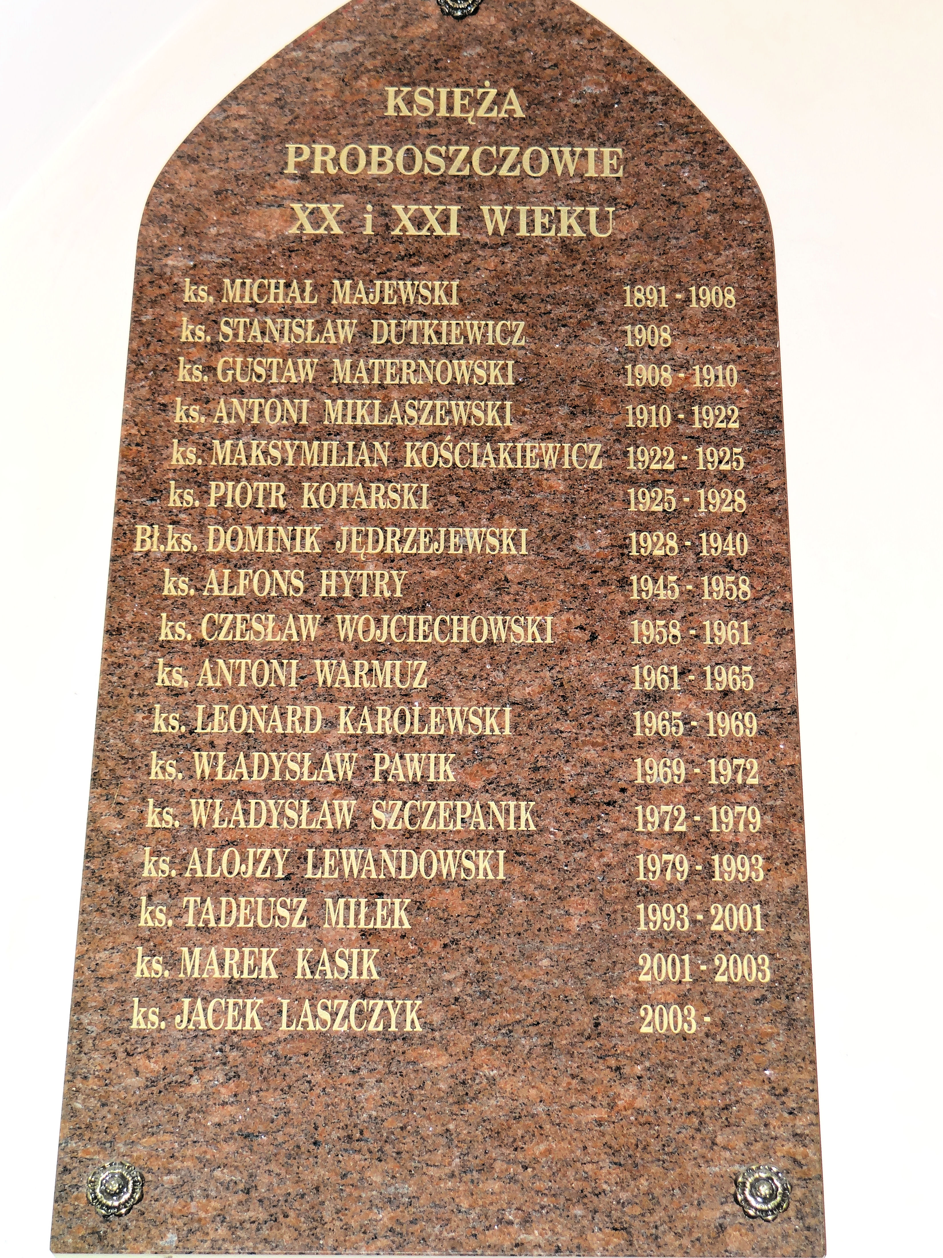 Wykaz księży Proboszczów w XX i XXI w tutejszej parafii w kruchcie kościoła św Andrzeja w Koninie w Gosławicach